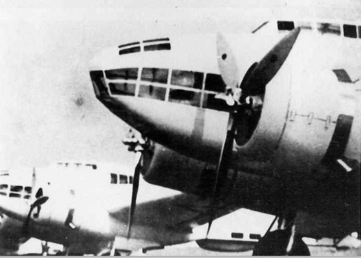 Savoia Marchetti SM.79 Bs Iraq Air force